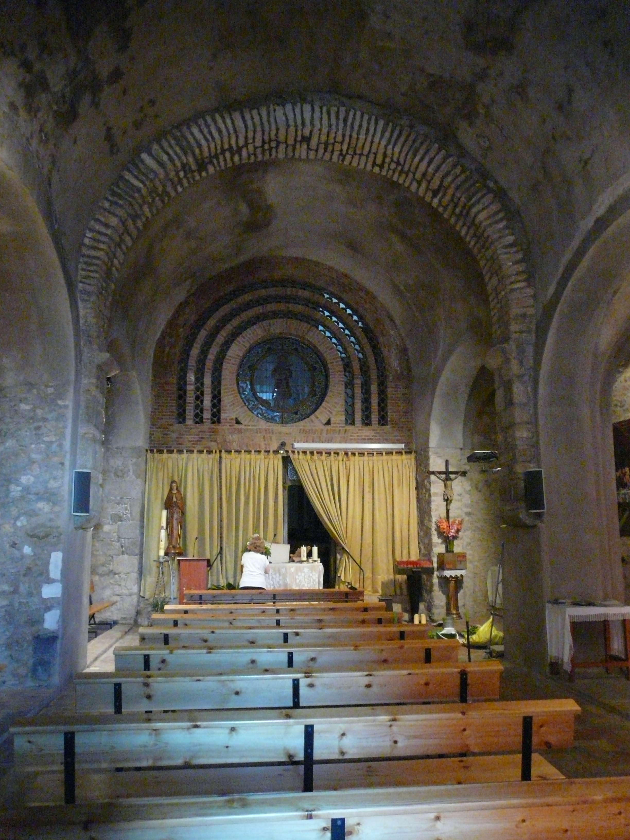 Església de Sant Feliu de Vilajuïga (Vilajuïga) Object location42° 19′ 30.16″ N, 3° 05′ 35.3″ E